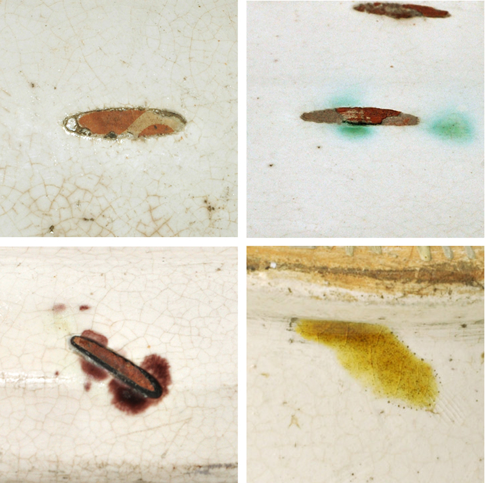 Anhaftende Glasureste auf der Rückseite von Bäriswiler Geschirr belegen, dass gleichzeitig im Töpferofen auch abweichend dekorierte "Alltagsgeschirre" gefertigt wurden.